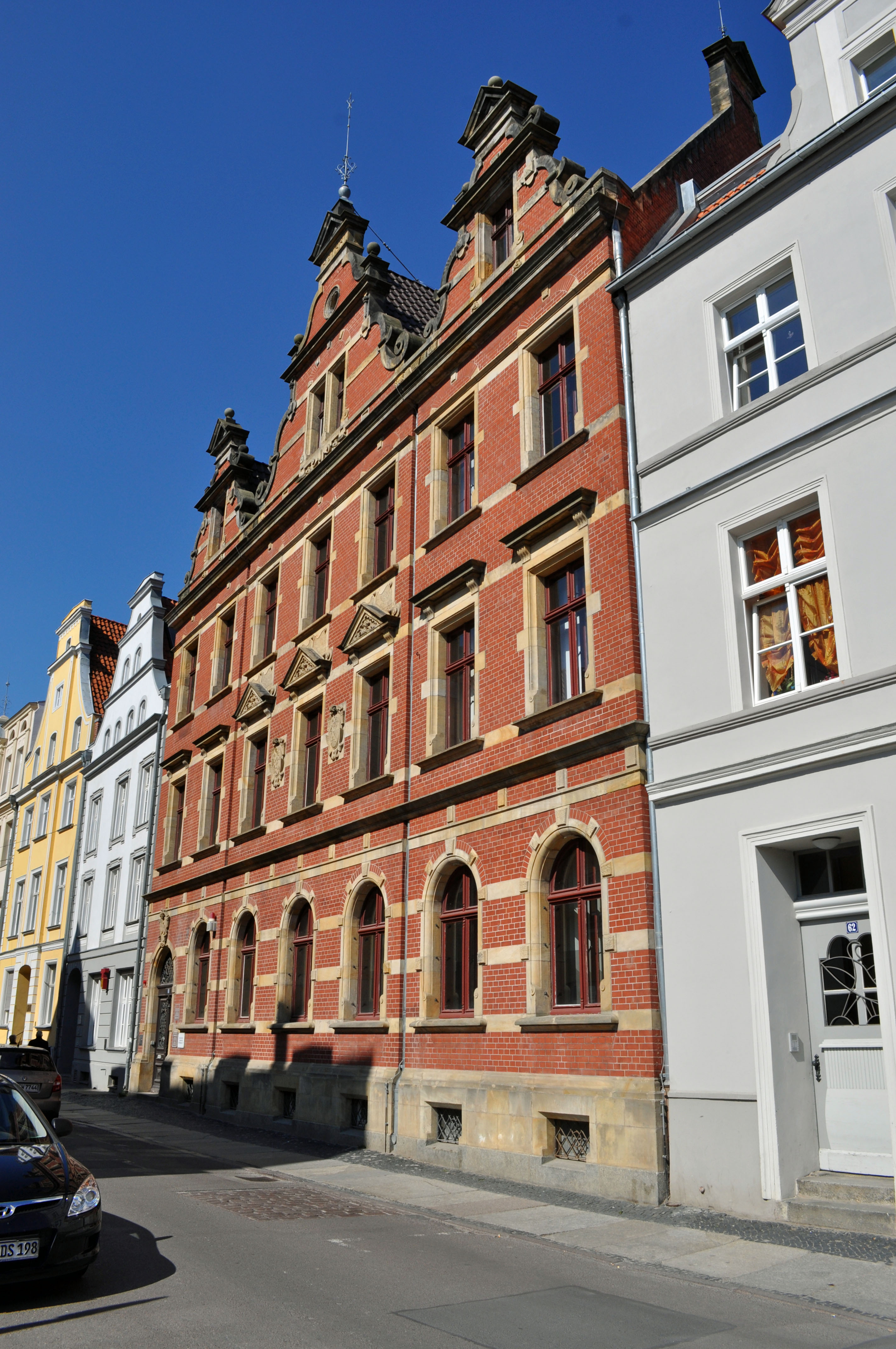 Gebäude bzw. Gebäudedetail in Stralsund. Straße und Hausnummer siehe Dateiname.